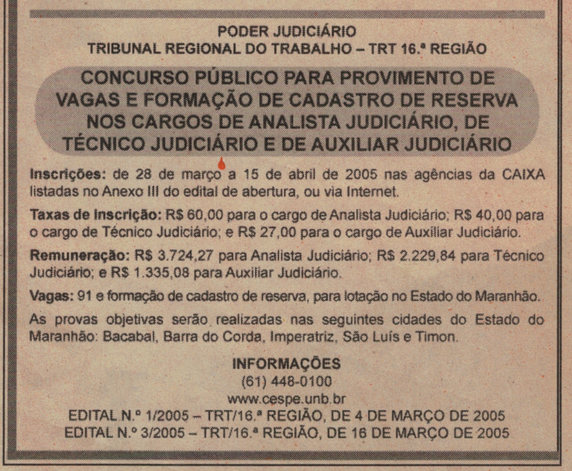 Estrato de publicação de realização de concurso público para órgão público no Brasil.